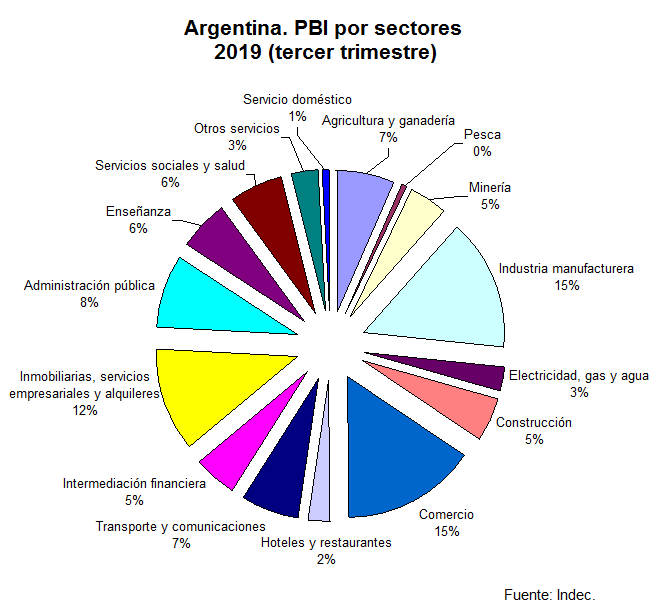 Argentina. PBI por sectores. 2019 (tercer trimestre). Fuente: Indec. Cuentas nacionales. Volumen 3. Nº 22. Informe de avance del nivel de actividad Tercer trimestre de 2019.